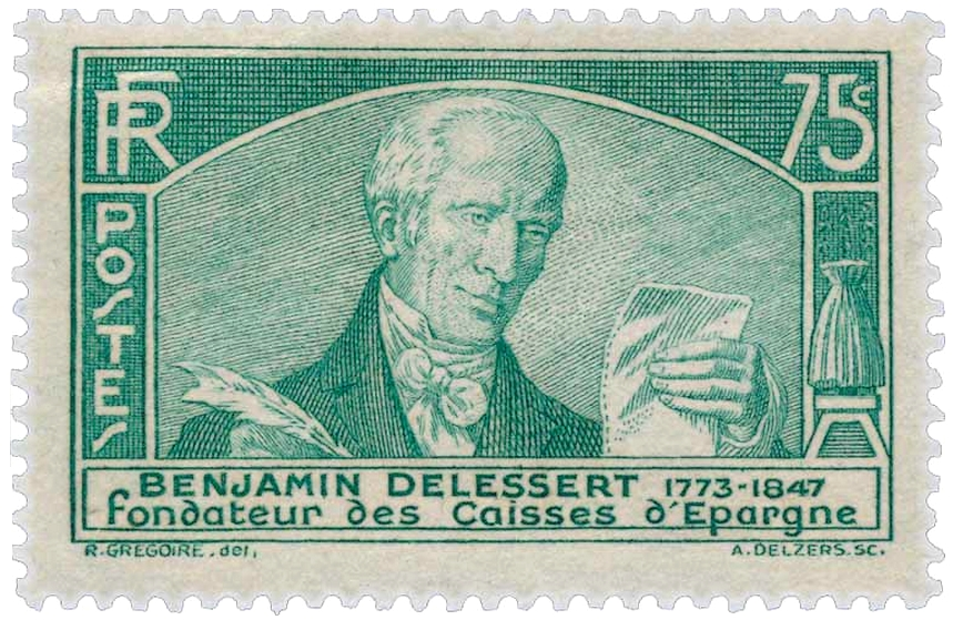 Benjamin Delessert, 1935, 0,75 franc. Dessinateur René Grégoire, graveur Antonin Delzers.